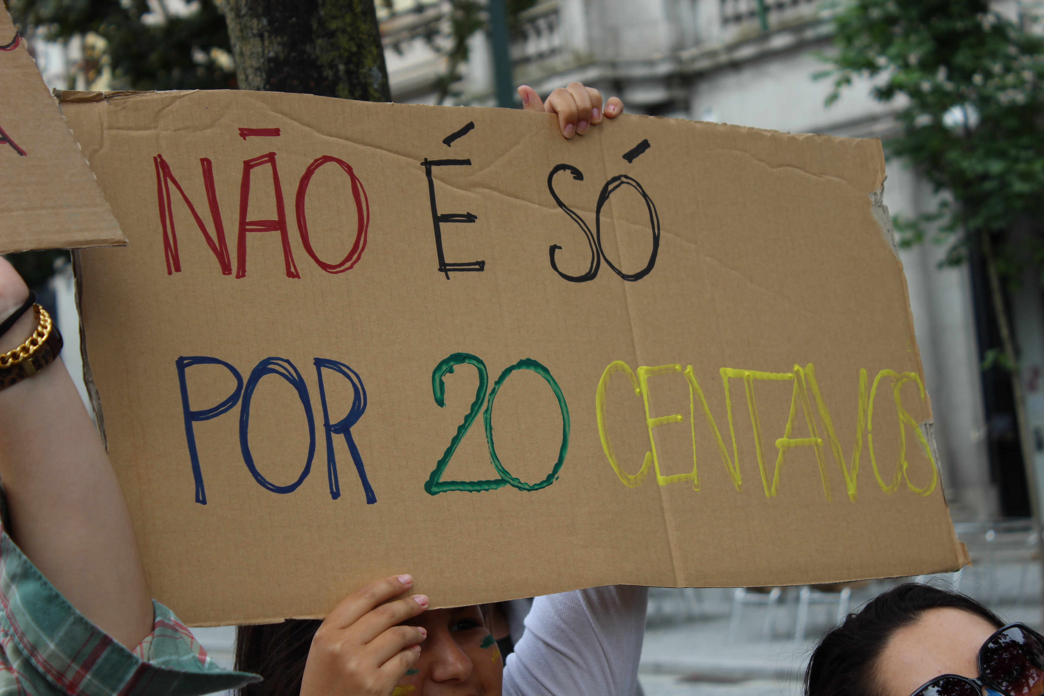 Brasil Porto 121